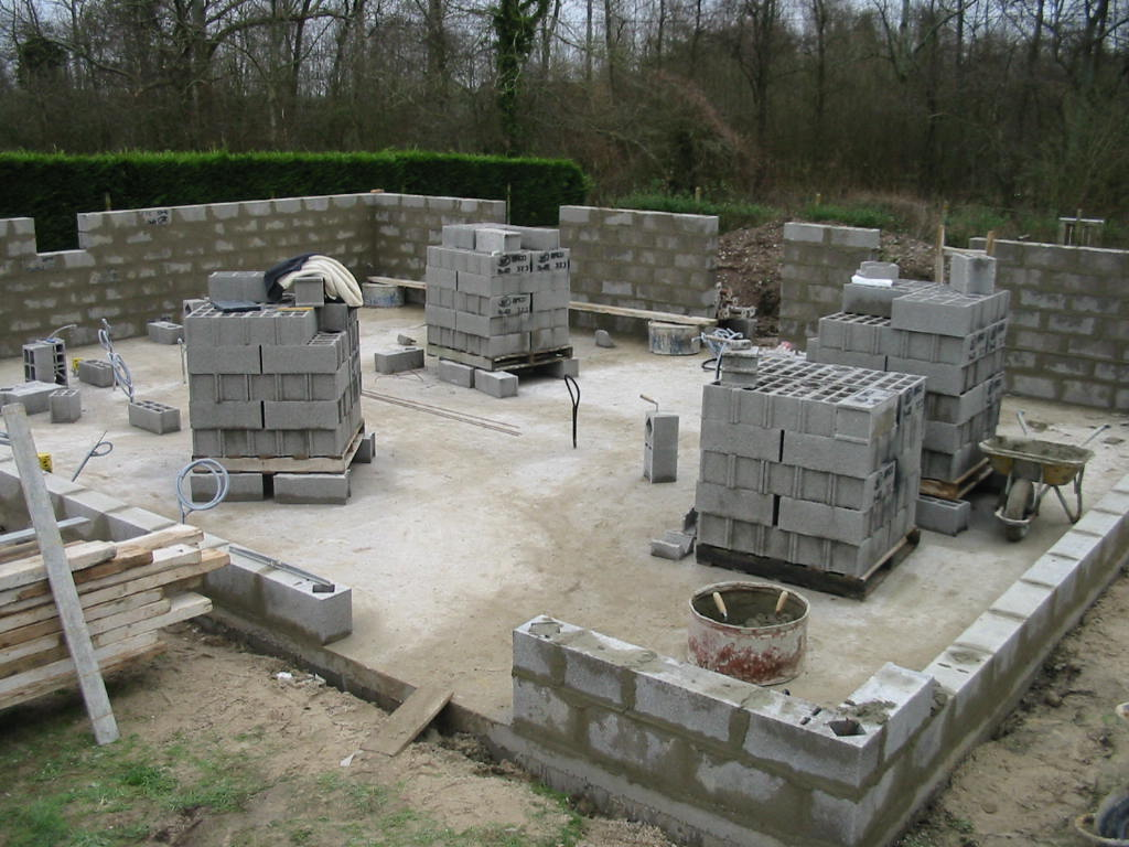 Exemple d'une construction en blocs de béton Auteur: PhY